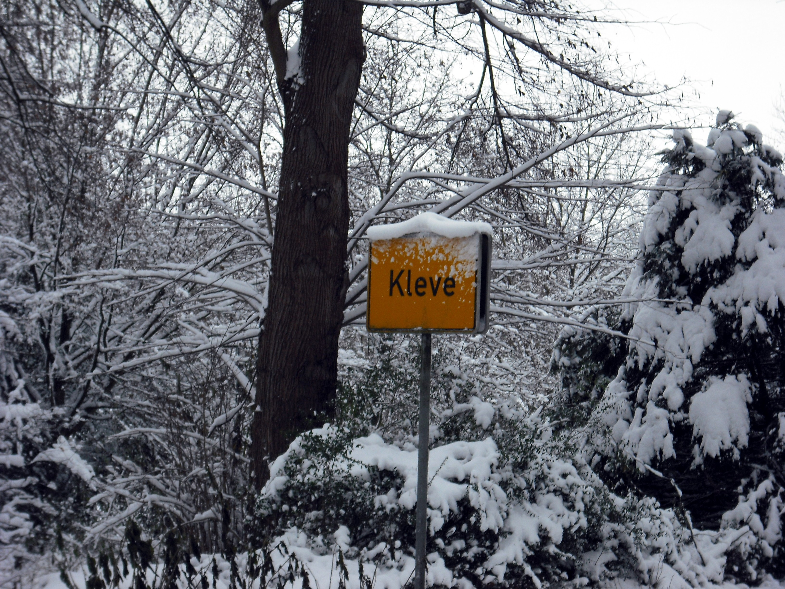 Bebouwde kom Kleef, Duitsland